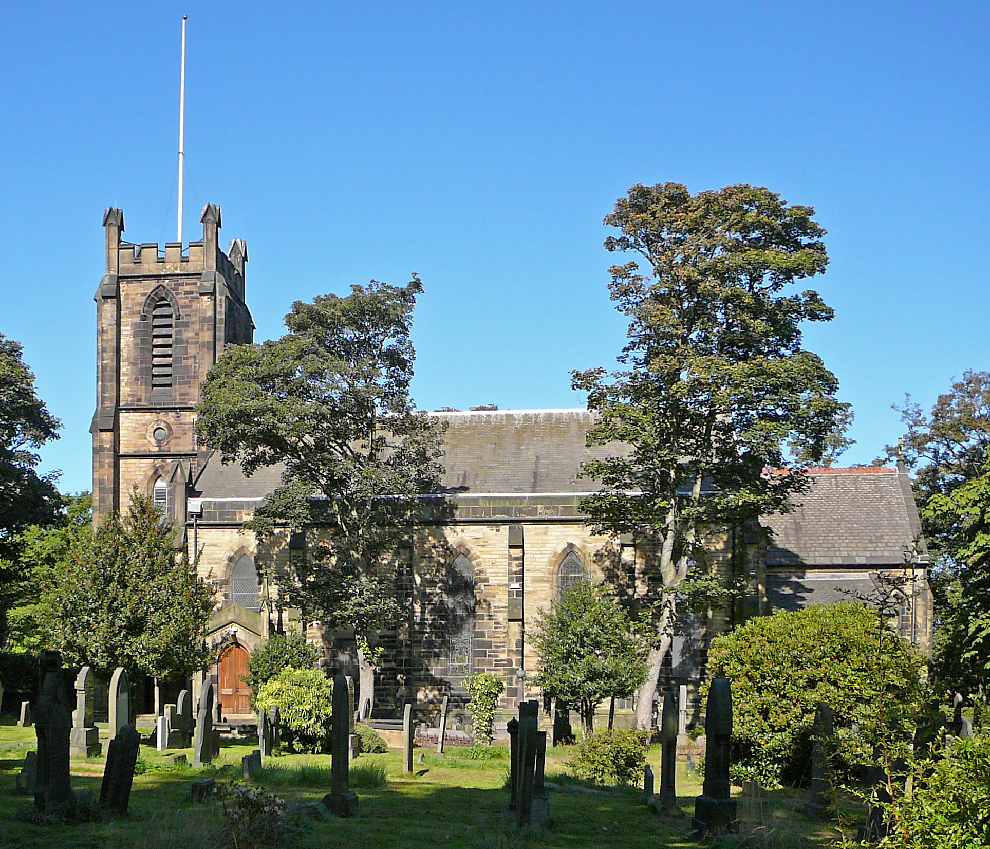 St Stephen, Lindley 1